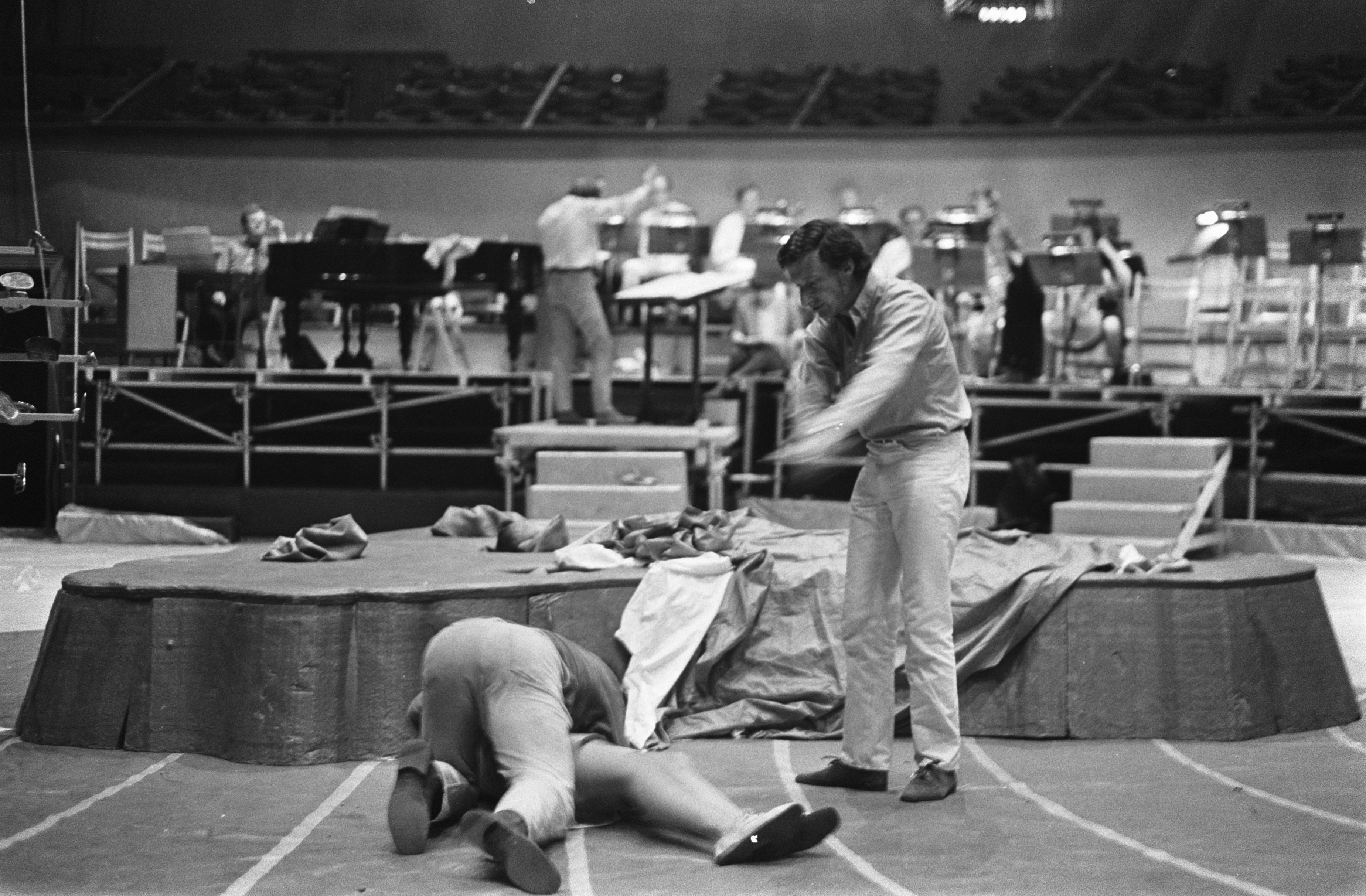 Collectie / Archief : Fotocollectie Anefo Reportage / Serie : Repetities van de opera "Reconstructie" in Theater Carré Beschrijving : Auteur Harry Mulisch (tevens regisseur) geeft aanwijzingen Datum : 18 juni 1969 Locatie : Amsterdam, Noord-Holland Trefwoorden : opera's, regisseurs, schrijvers, theaters, toneelrepetities Persoonsnaam : Mulisch, Harry Fotograaf : Rob Mieremet / Anefo Auteursrechthebbende : Nationaal Archief Materiaalsoort : Negatief (zwart/wit) Nummer archiefinventaris : bekijk toegang 2.24.01.05 Bestanddeelnummer : 922-5364